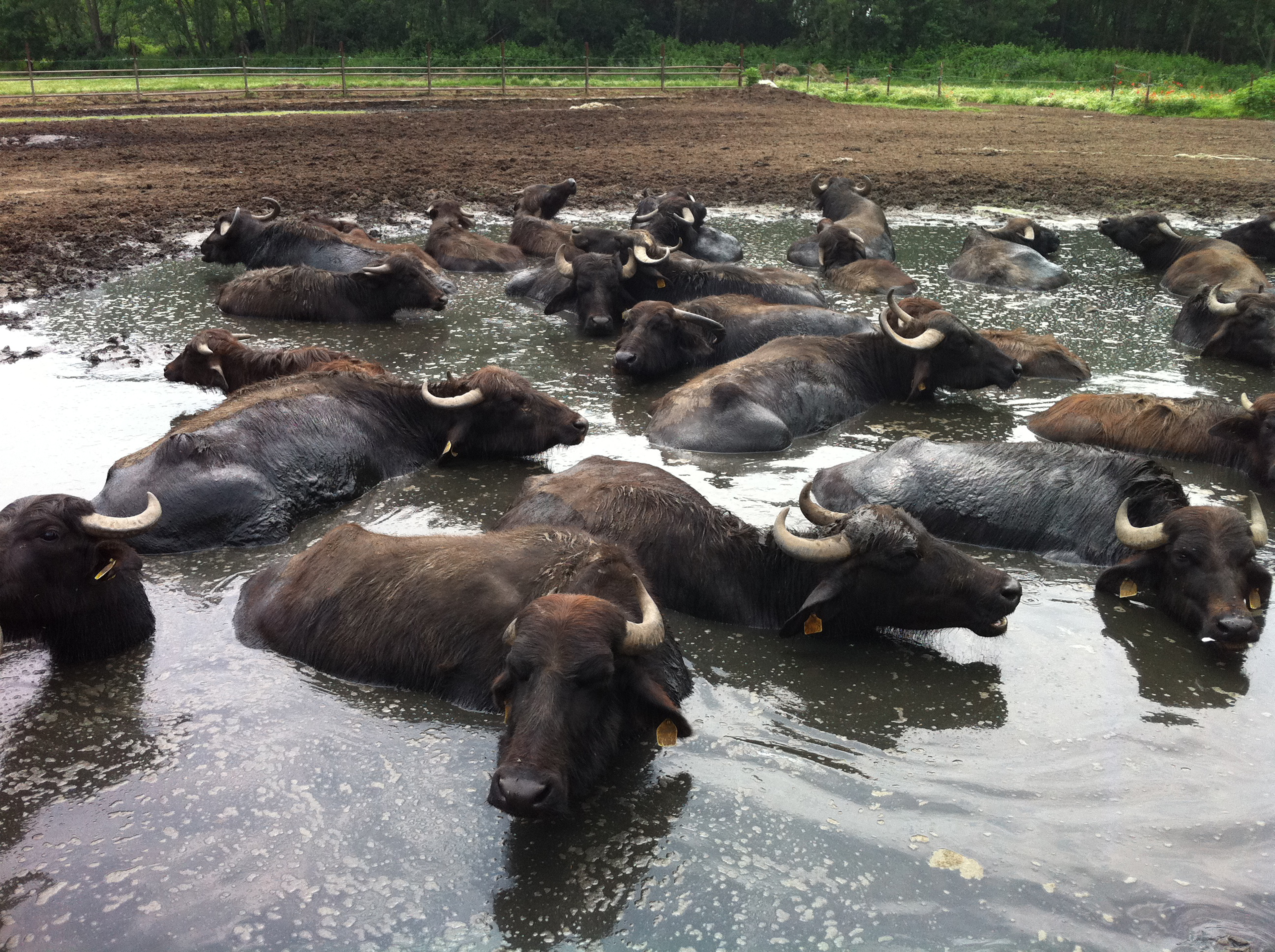 Λίμνη Κερκίνη - Χωριό Κερκίνη This is a photography of Natura 2000 protected area with ID GR1260008